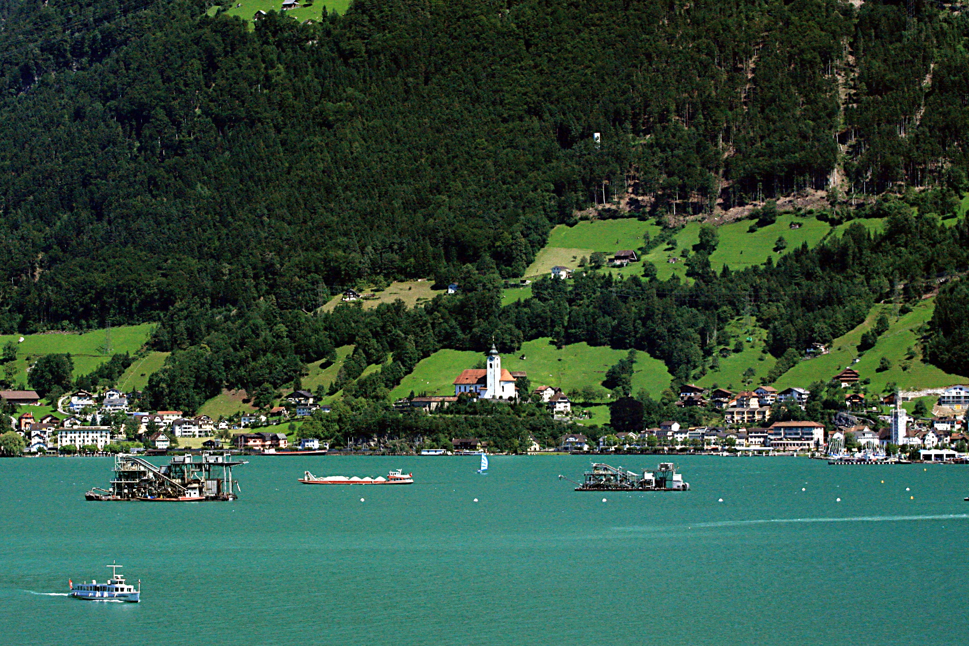 Flüelen, Urnersee, Switzerland